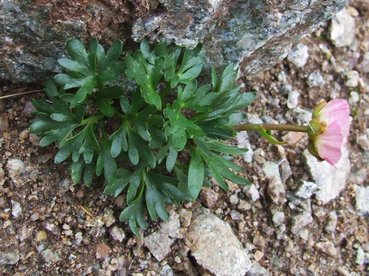 Ranunculus glacialis. Habitat:High Tatra Mountains (przełęcz Czerwona Ławka)